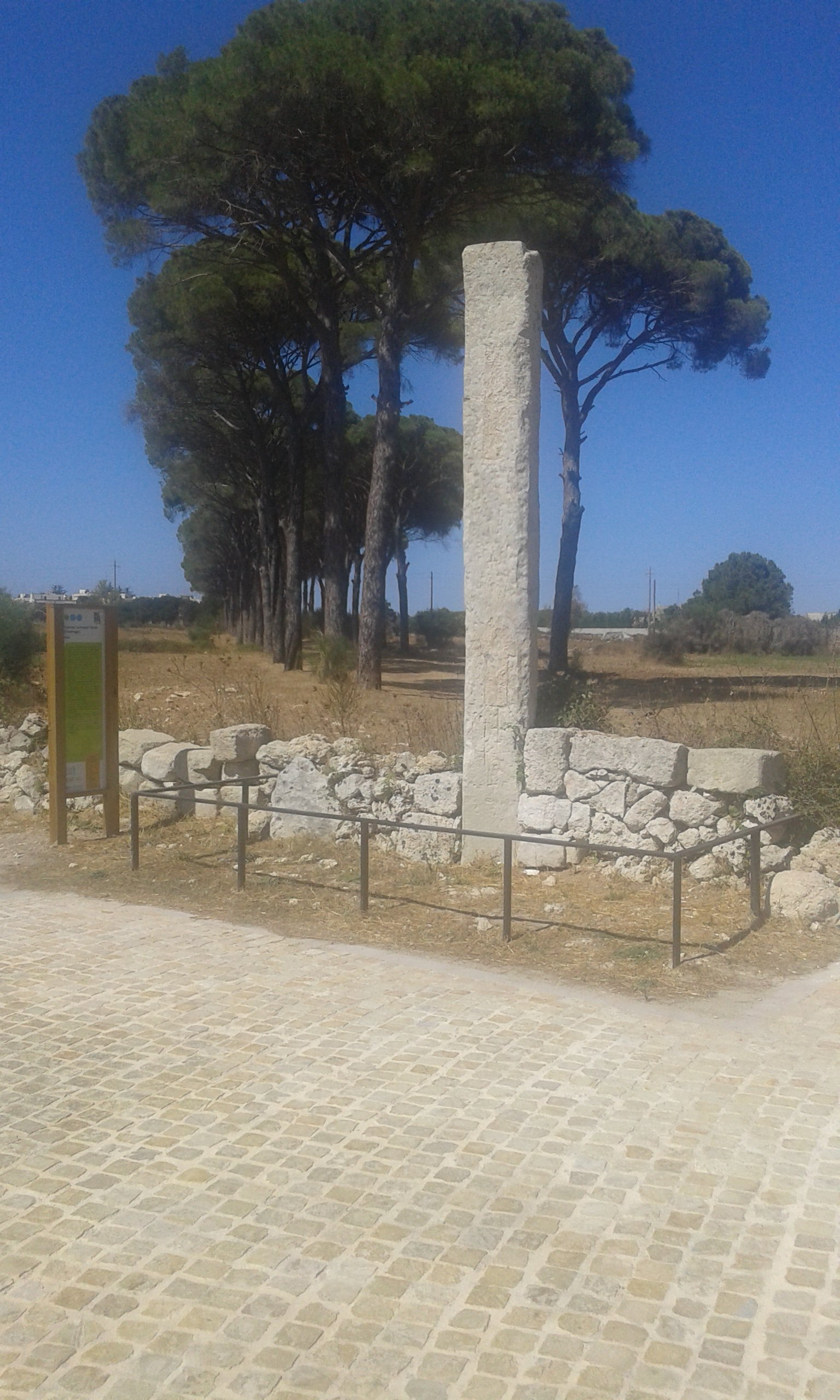 Menhir, zona Franite